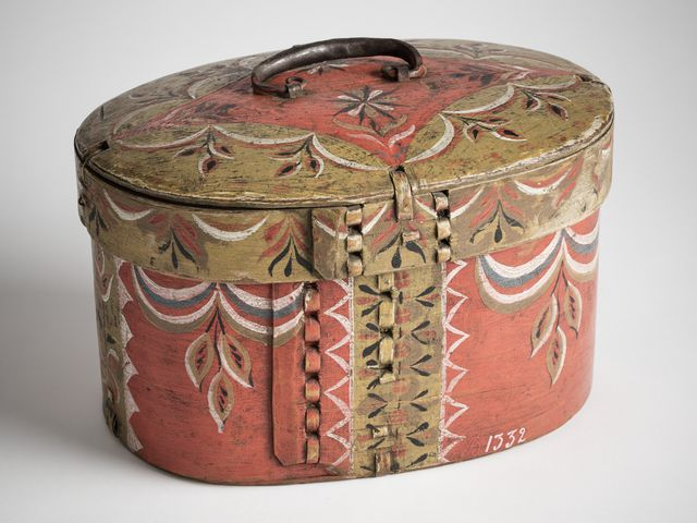 Kirkkovakka Lammilta, 1850